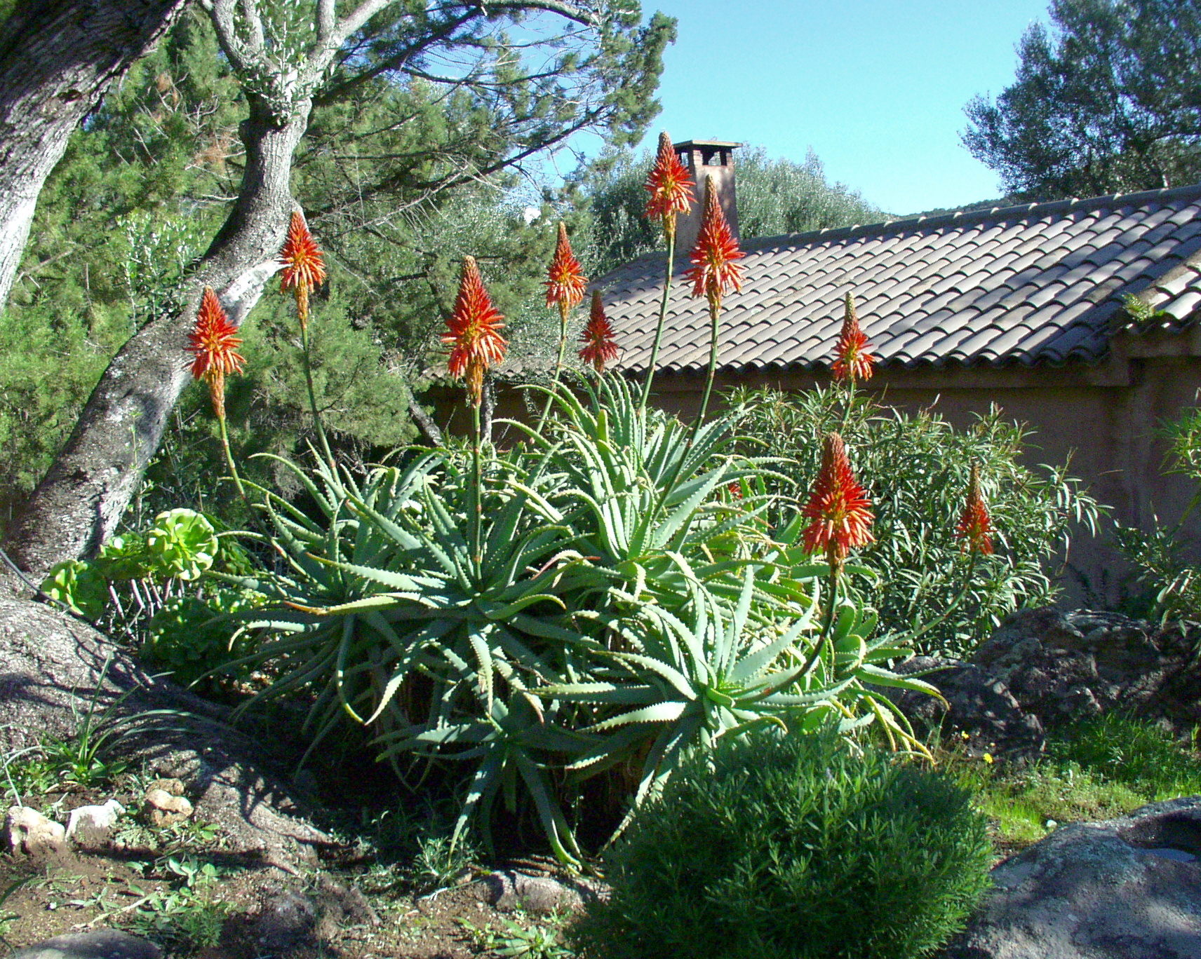 Aloes en fleurs. Aloe arborescens.